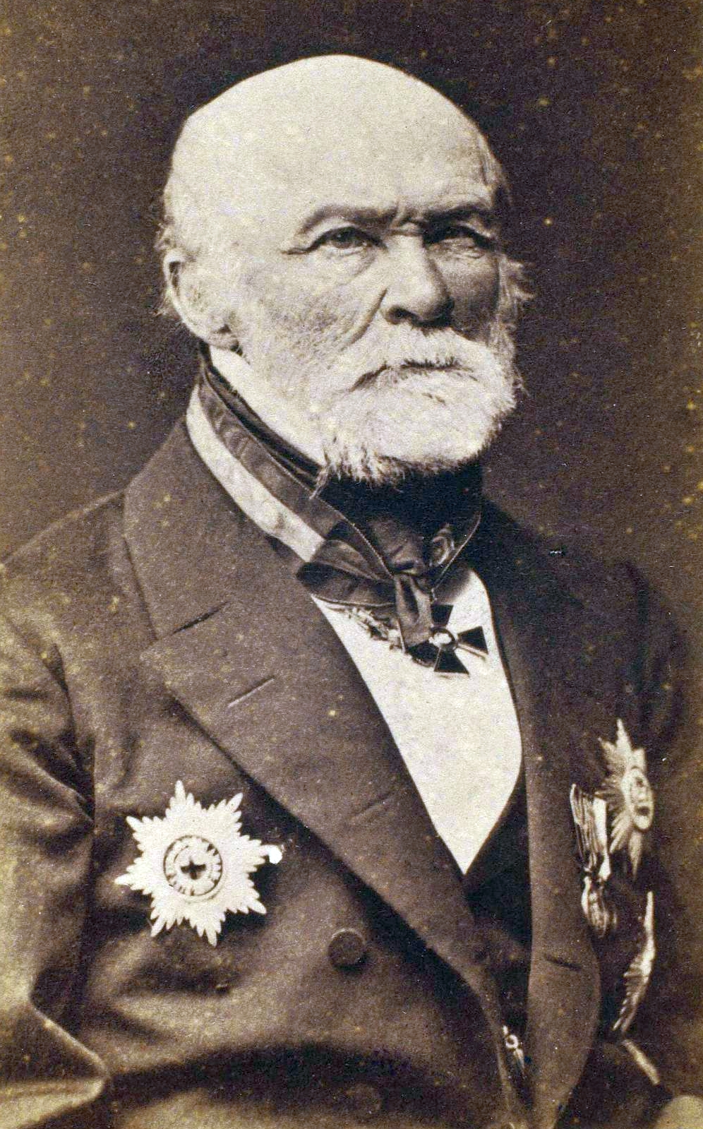 Пирогов, Николай Иванович